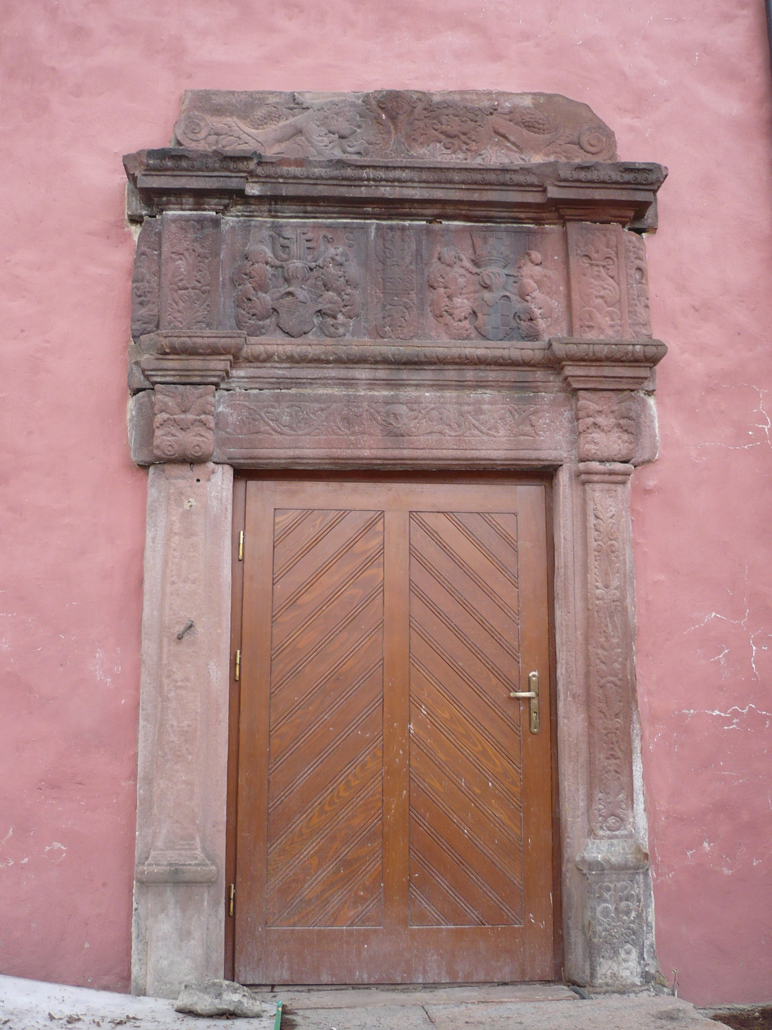 Nowa Ruda, ul. Kościelna 30 - Dwór Górny, obecnie hotel, XVII, XIX w. (zabytek nr A/940/652/WŁ z 25.05.1977)